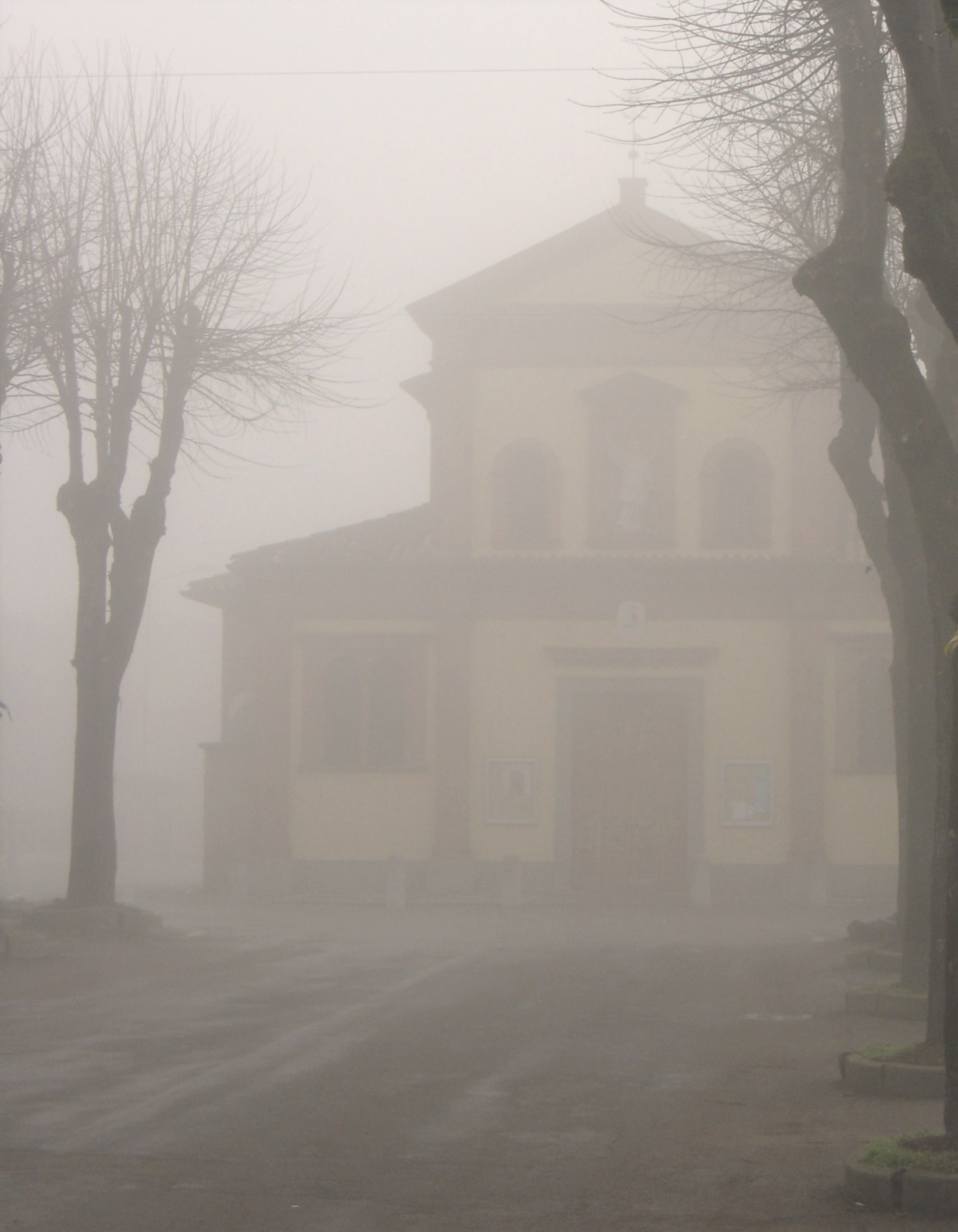 La nebbia in piazza della chiesa a Sola